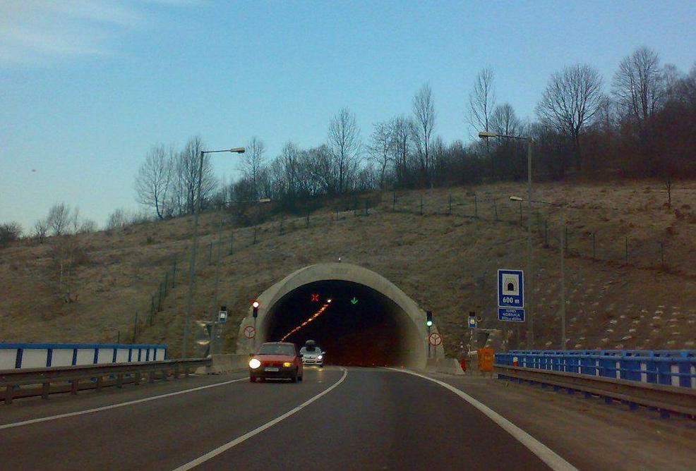 Tunnel Horelica